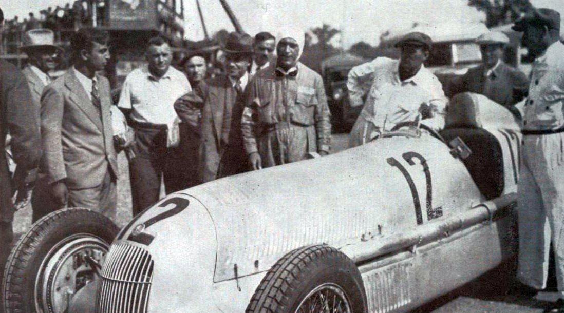 Luigi Fagioli, Mercedes-Benz W25, vainqueur du Grand Prix d'Italie 9 Sep 1934 (avec Caracciola).